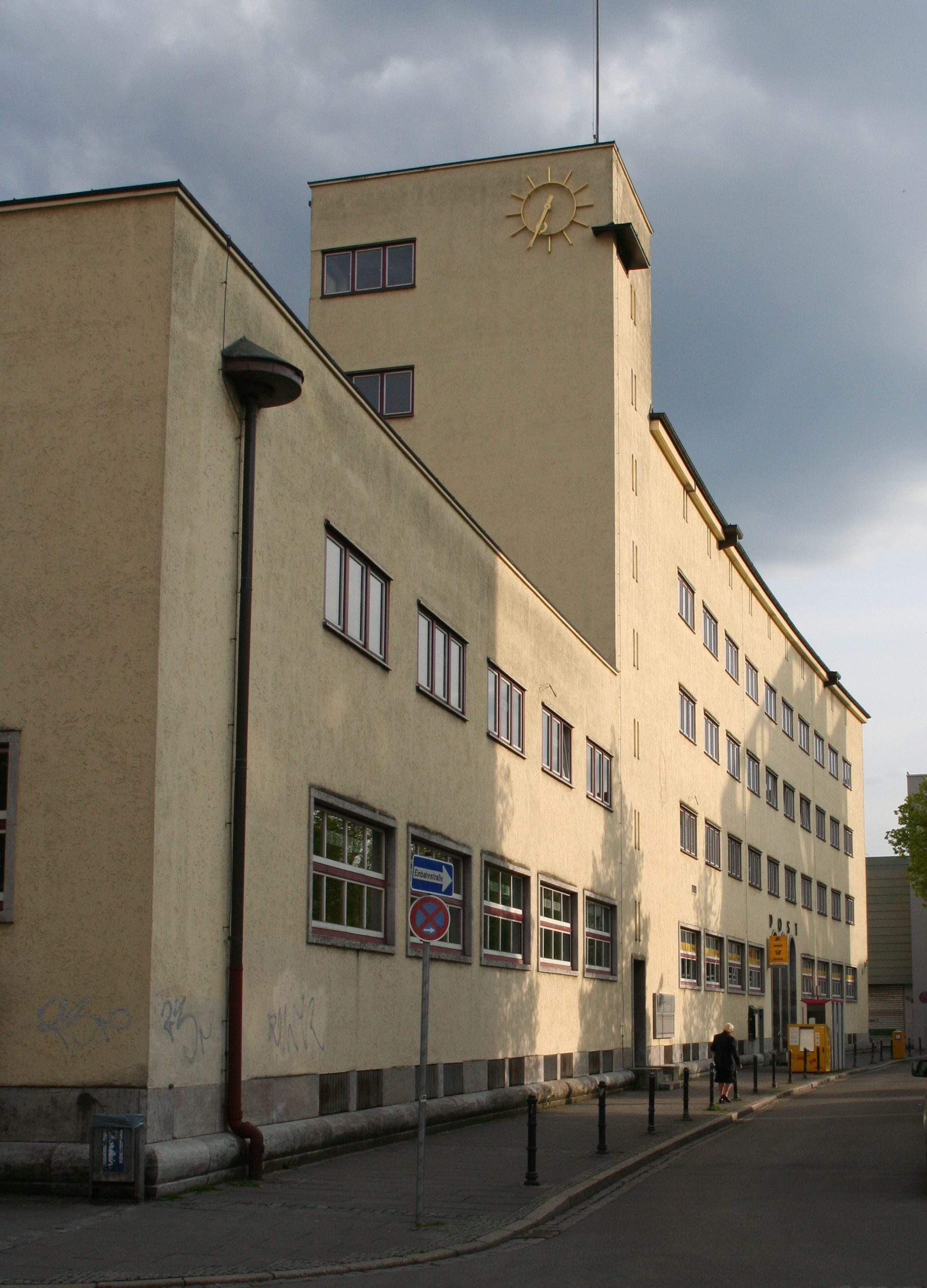 Hindenburgstraße 6 in Coburg (Hauptpost)